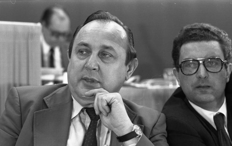 28. Ordentlicher Bundesparteitag der FDP in der Kieler Ostseehalle (links: Hans-Dietrich Genscher, rechts: Gerhart Rudolf Baum) 6.-8.11.1977